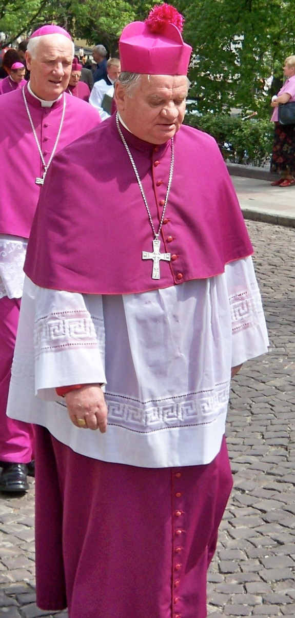 bp Tadeusz Rakoczy